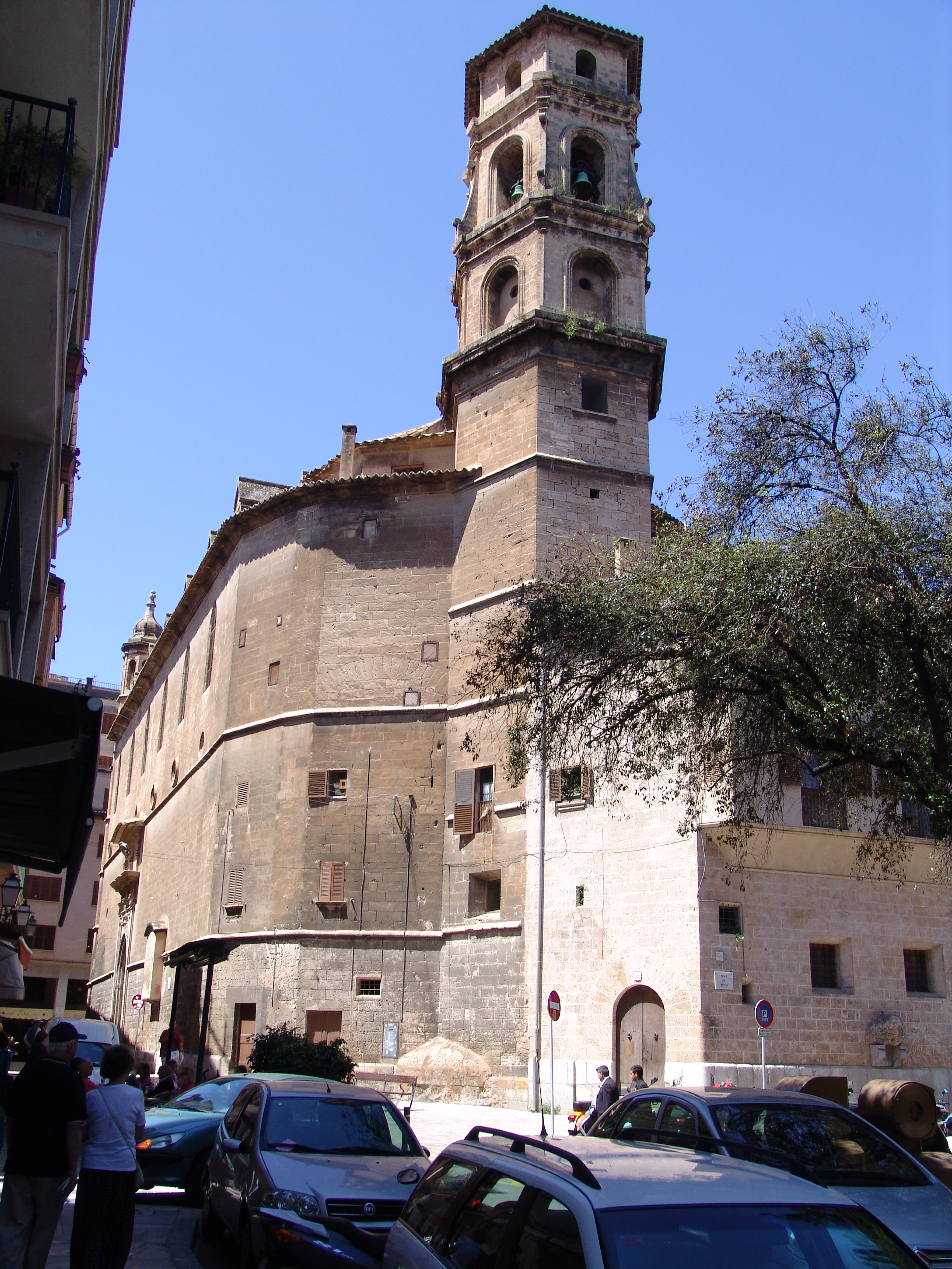 Kirche in Palma de Mallorca